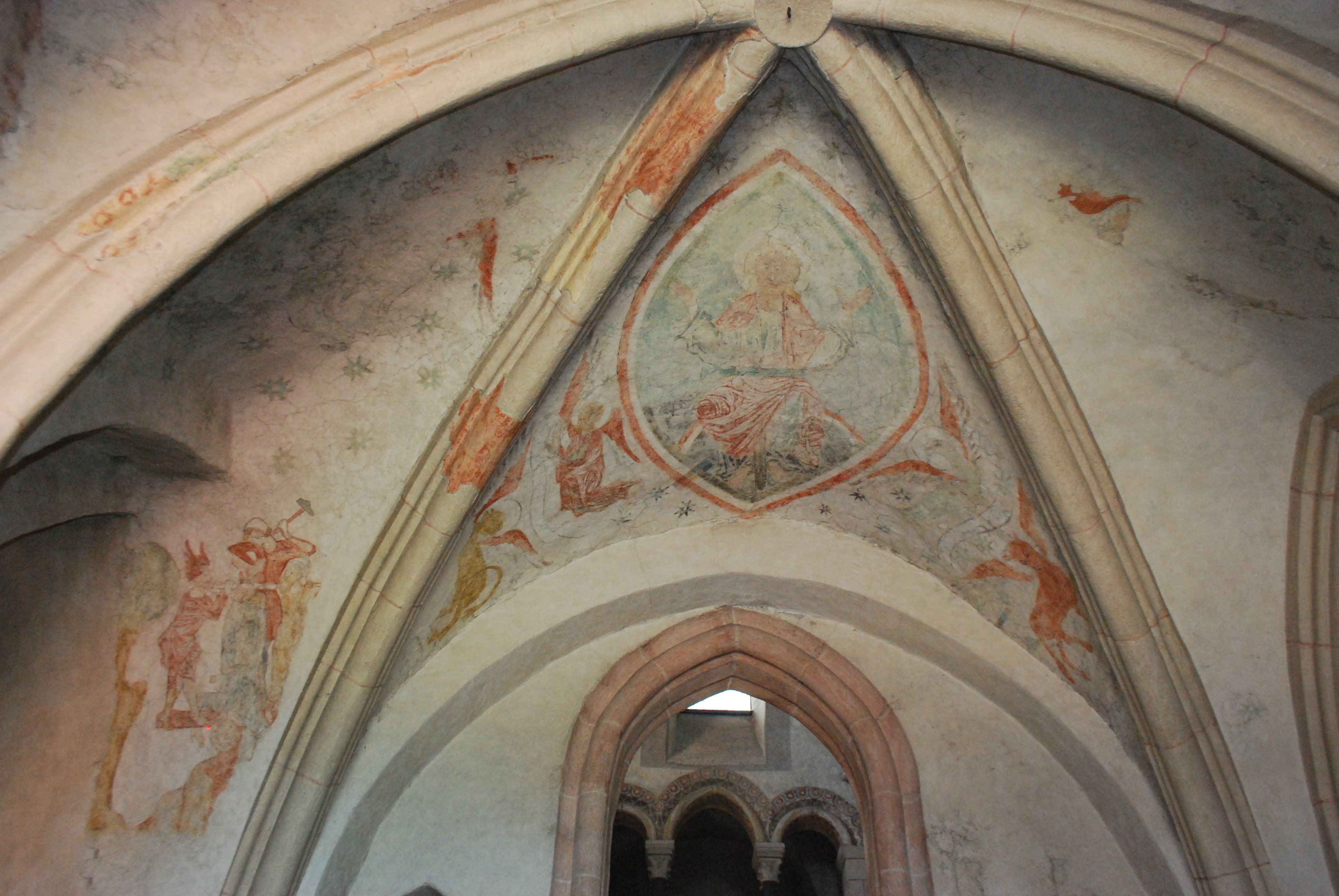 La tribune du choeur de la cathédrale de Limburg an der Lahn : fresque avec la crucifixion de saint Pierre.